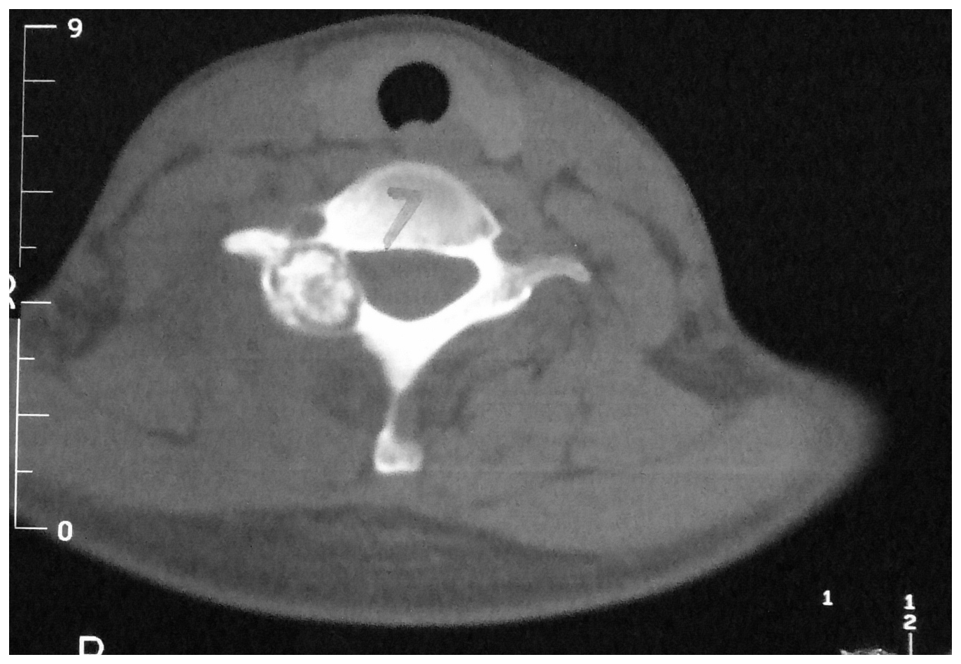 Osteoblastoma a livello della porzione posteriore della settima vertebra cervicale osservato mediante TC. La lesione appare ipodensa con calcificazioni iperdense nel suo contesto. Intorno alla lesione è possibile osservare un orletto di sclerosi non sempre ben definito (caratteristica di una forma di malattia aggressiva) Tratto da: Zhonghai Li. et al. 2013 Clinical Features and Surgical Management of Spinal Osteoblastoma: A Retrospective Study in 18 Cases CC-BY 4.0 License